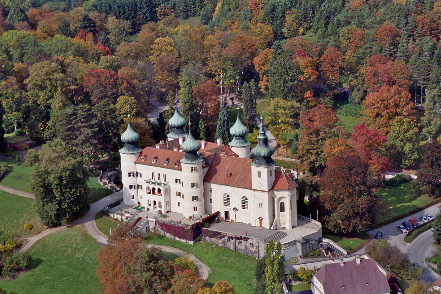 Schloss Artstetten samt Gartenanlage (Freitreppen, Stützmauern, Badehaus u.dgl.) und Pfarrkirche, Burg-, Schlosskapelle hl. Jakobus